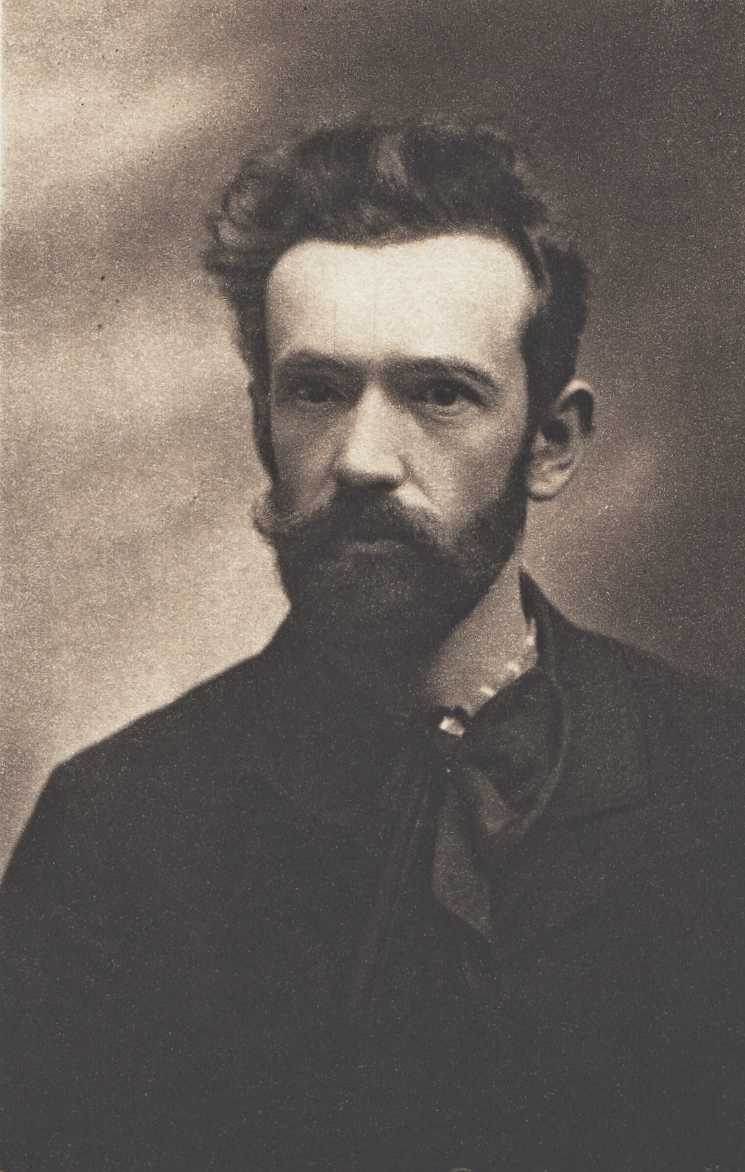 Michael Kácha (1874 - 1940), Český novinář.